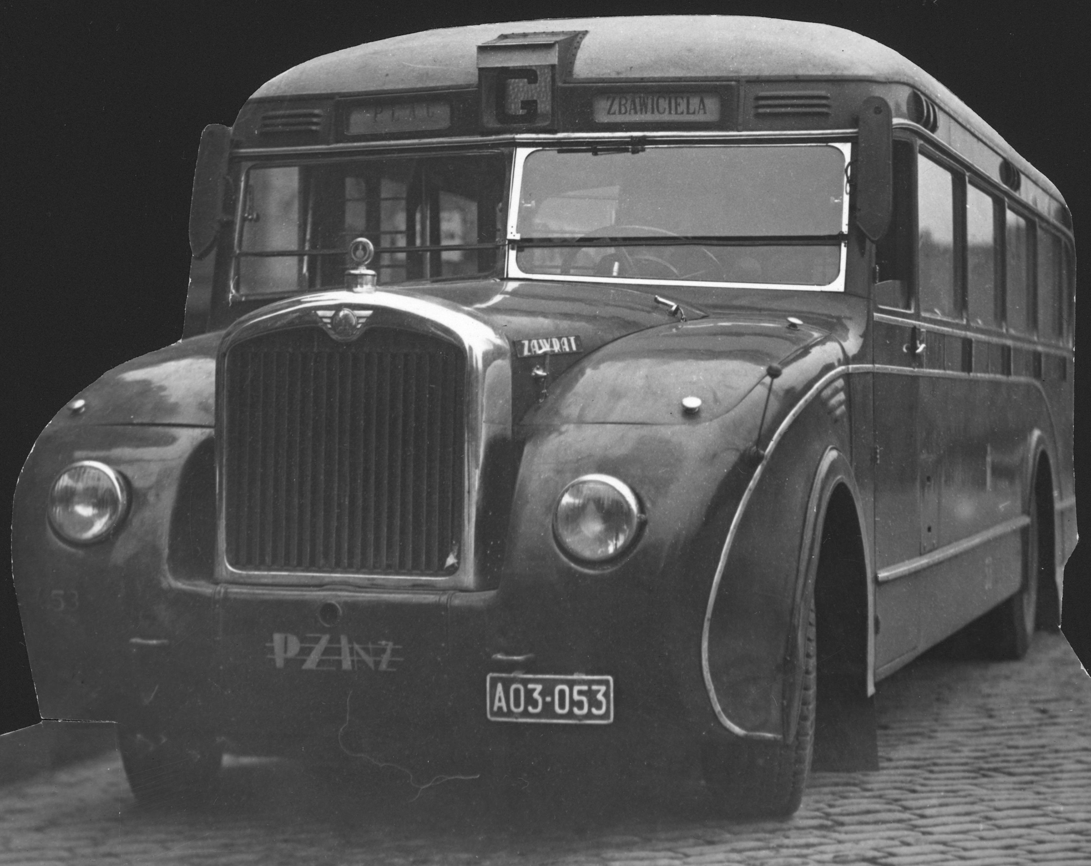 Autobus Zawrat linii "G" montowany na licencji firmy Saurer z nadwoziem wykonanym w PZInż.